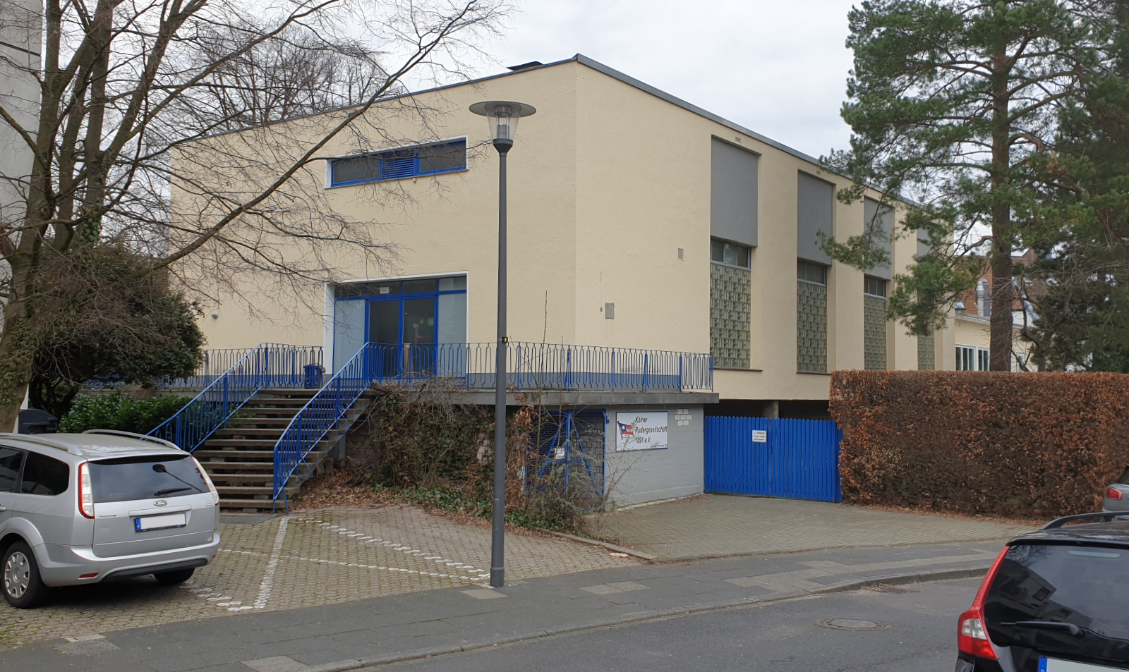 Turnhalle und Fitnessstudio der Kölner Rudergesellschaft 1891 e. V. im Stadtteil Rodenkirchen.